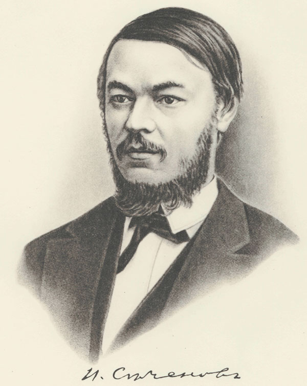 Портрет русского физиолога И. М. Сеченова (1829-1905)